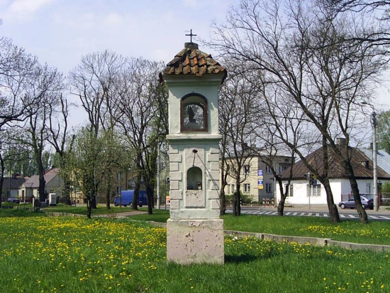 Międzyrzec Podlaski. Kapliczka w parku.